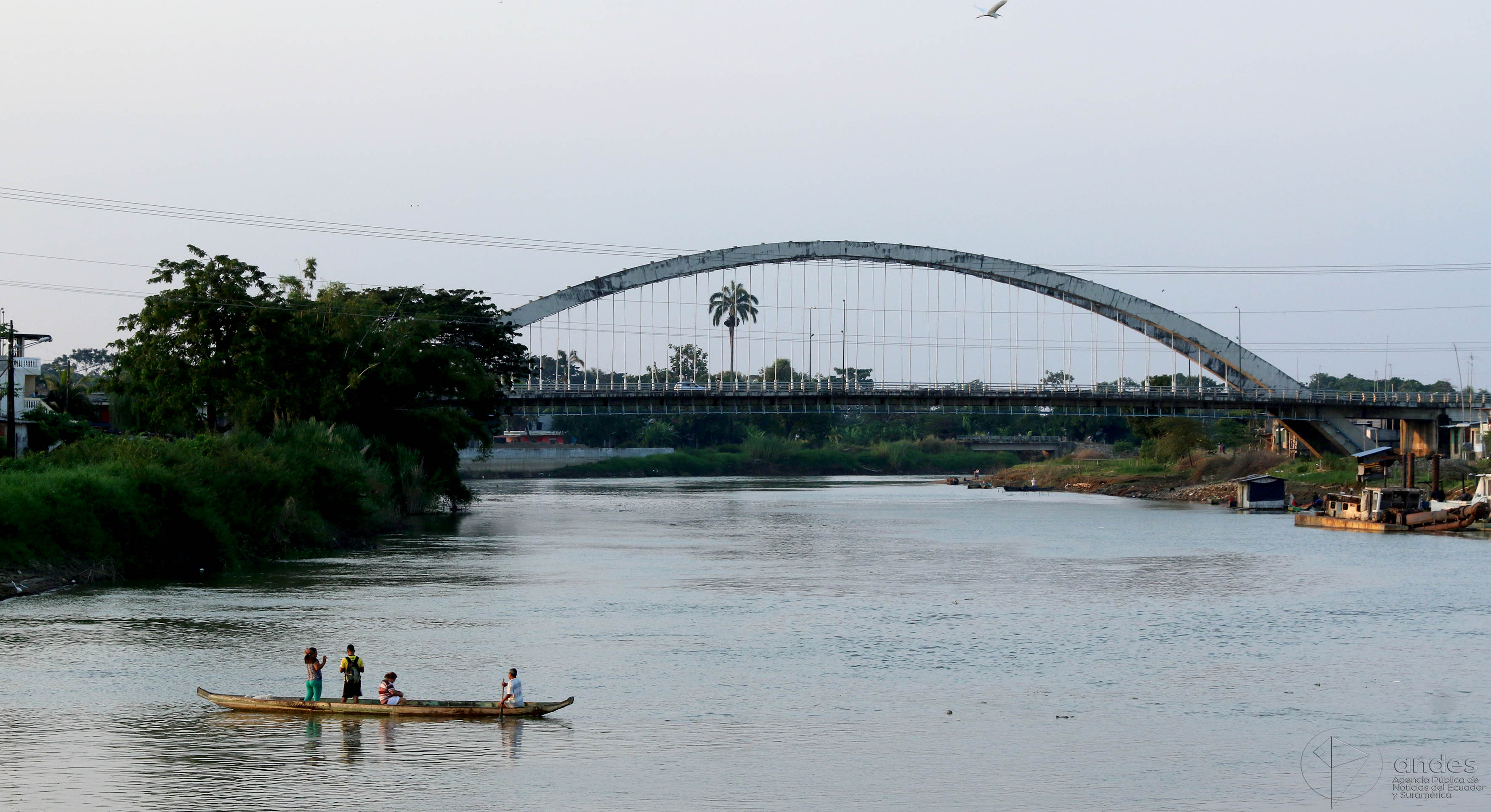 Babahoyo, sábado 03 de junio del 2017 (Andes).-Un paseo por el río frente al malecón también forma de los atractivos turísticos del cantón fluminense. Foto:Andes/César Muñoz